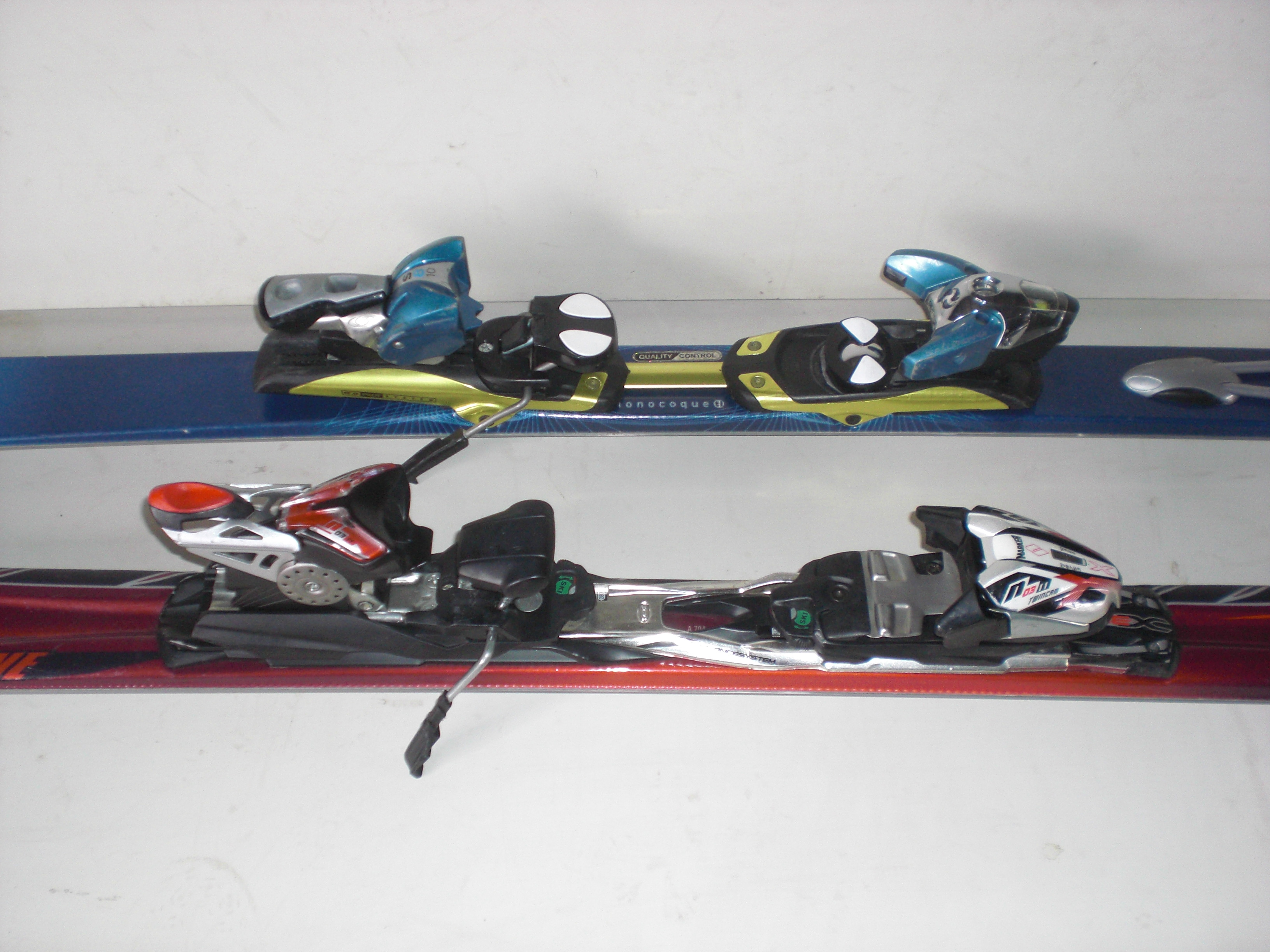 トーピース・ヒールピース一体型ビンディングの一例、ビンディングをスキーに固定する部分を変えているものもある。